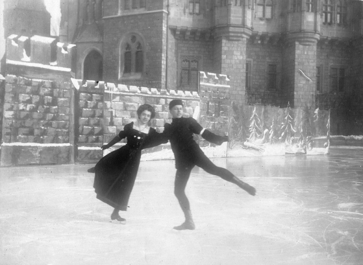 Ludowika and Walter Jakobsson in Budapest